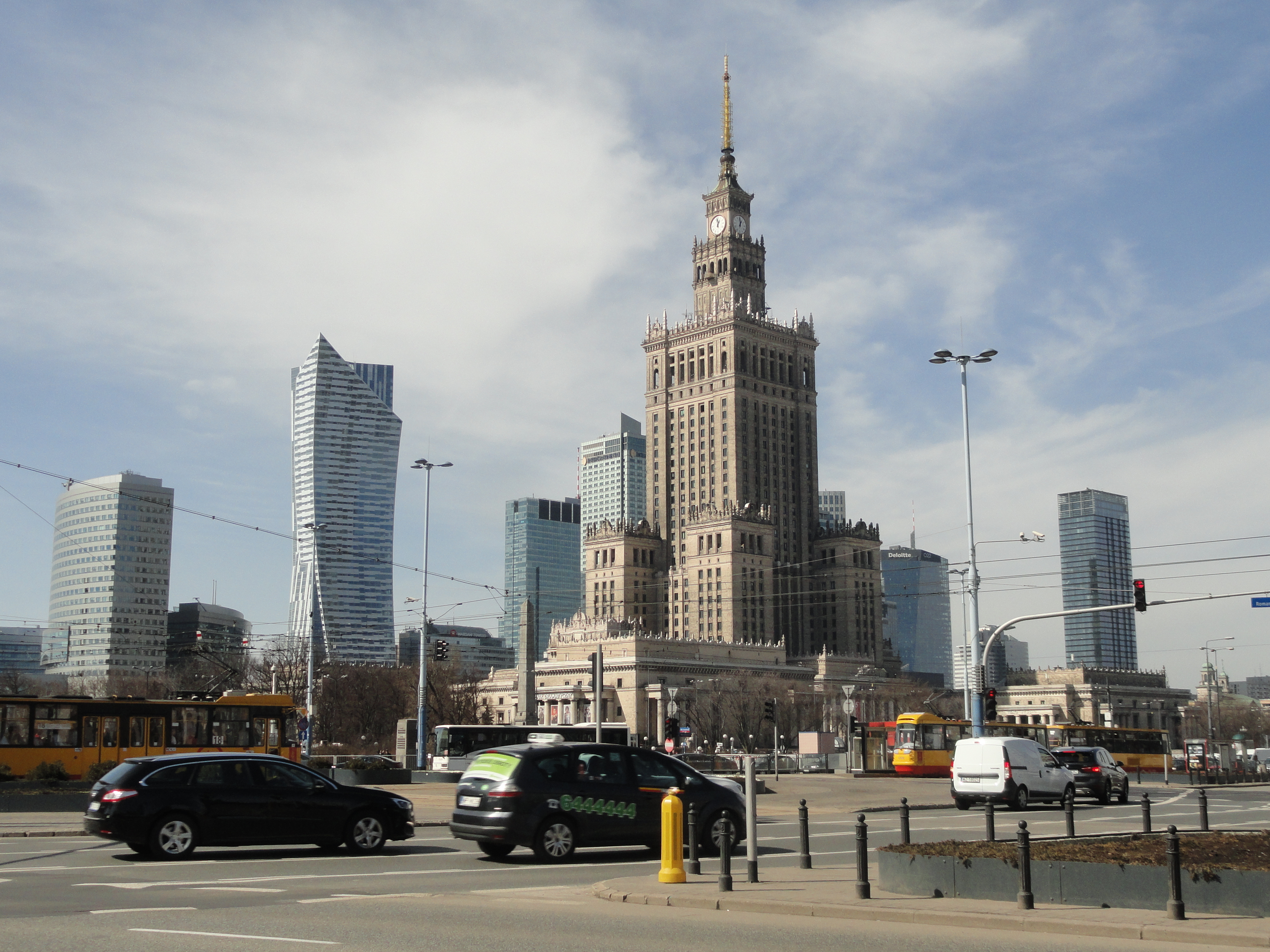 Zabudowa centrum Warszawy z ronda Dmowskiego.